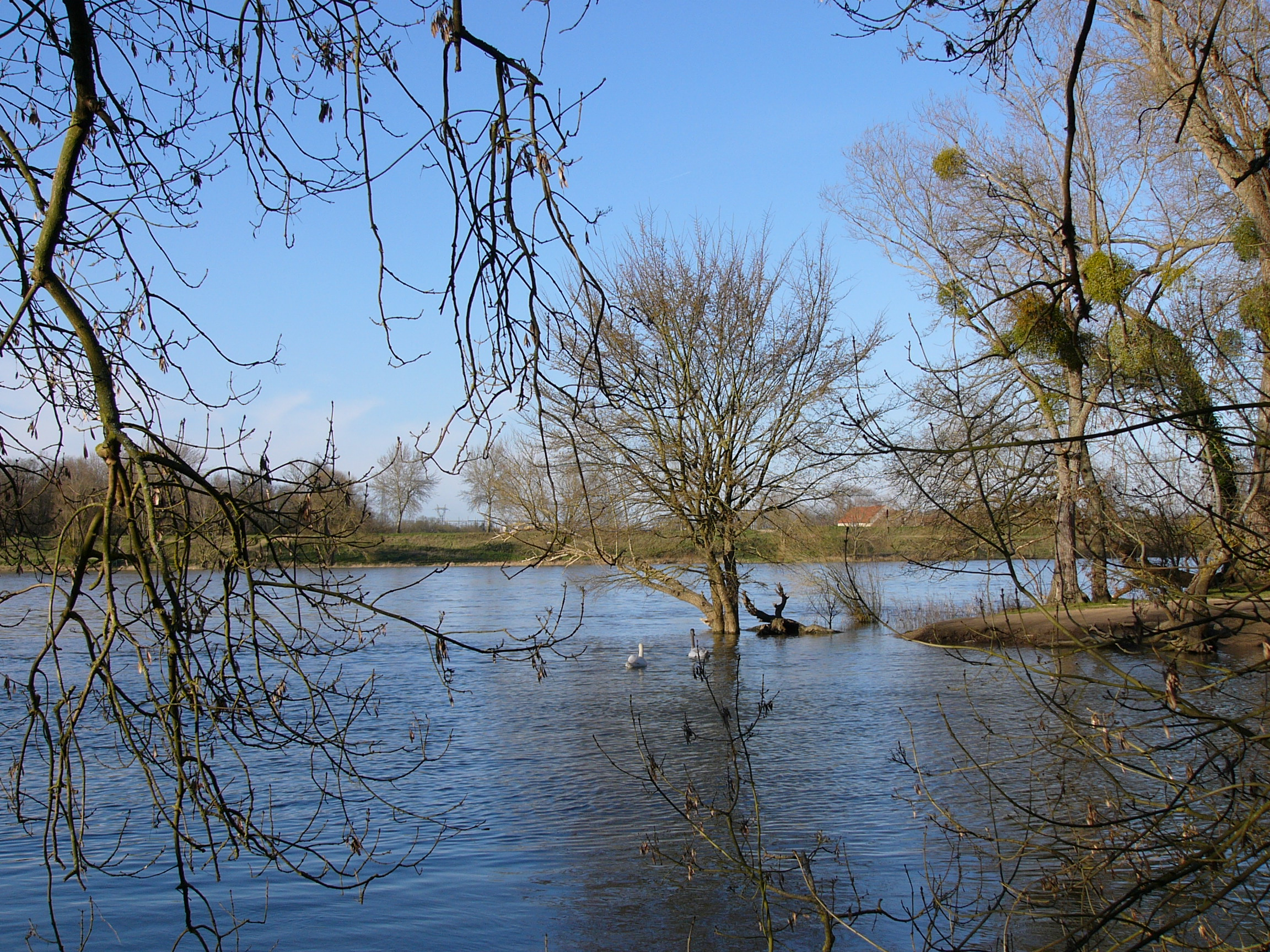 La pointe de Courpain, au confluent du Loiret (au premier plan) et de la Loire, Saint-Pryvé-Saint-Mesmin, Loiret, France